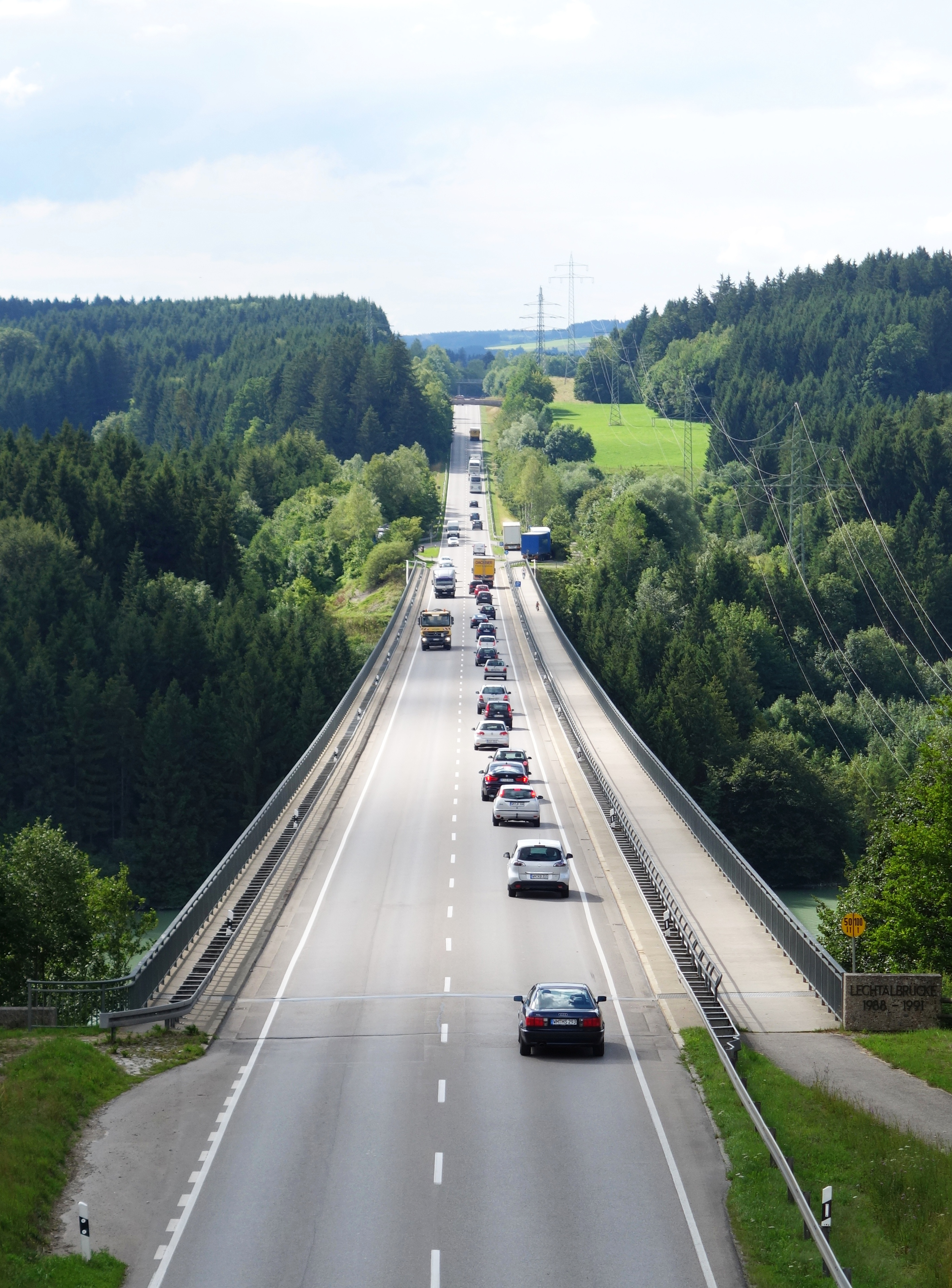 Lechtalbrücke (Schongau) von Osten gesehen (von der Überführung der Verbindungsstraße Peiting–Kreut aus)